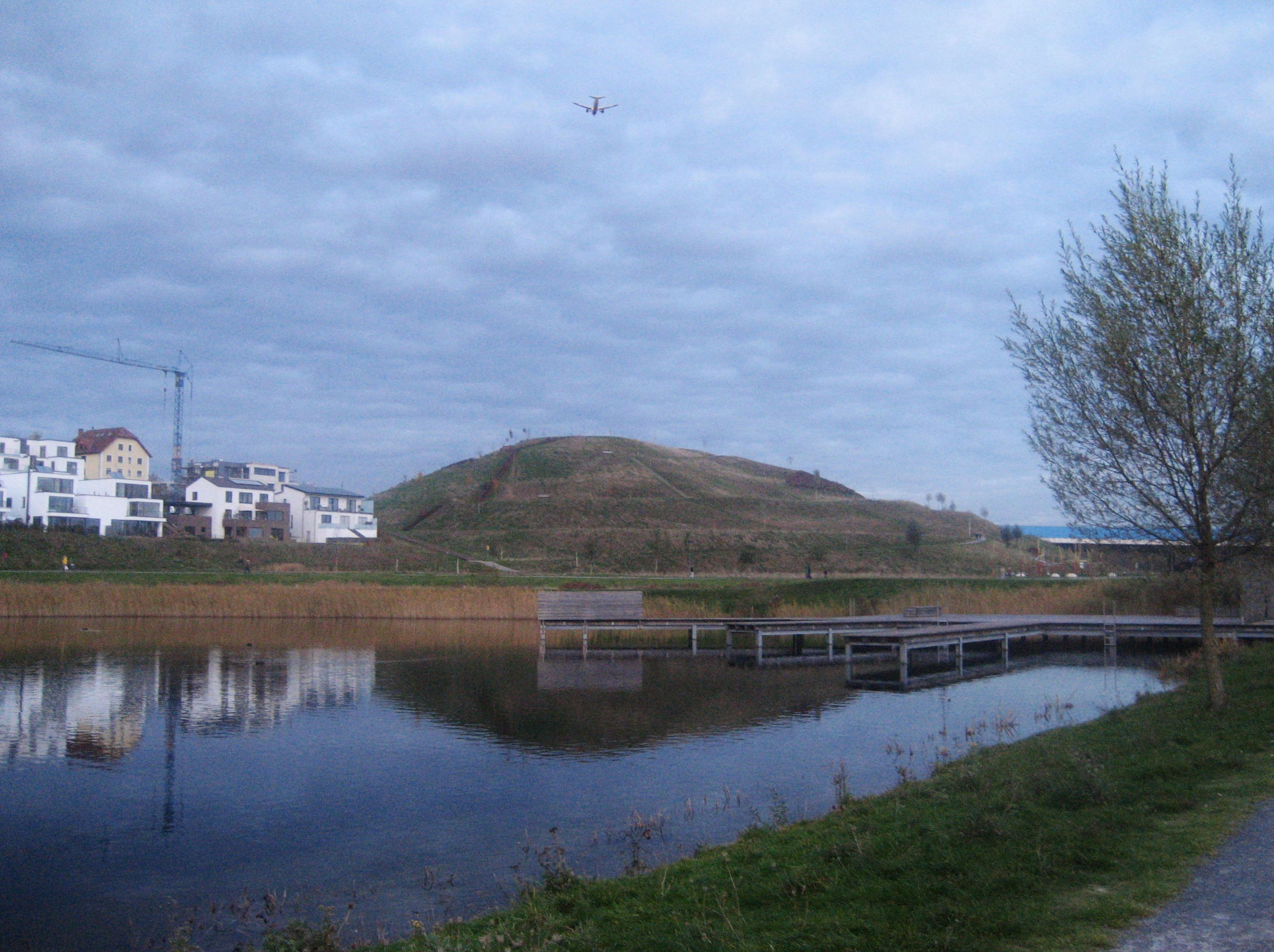 Östlich des Phönixsees (Dortmund) wurde der überschüssige, belastete Bodenaushub unter ein sog. Landschaftsbauwerk verbracht, um die Deponiekosten zu sparen (mündl. Auskunft des WDR, der dazu seinen Kontakt bei der Stadt befragt hat).